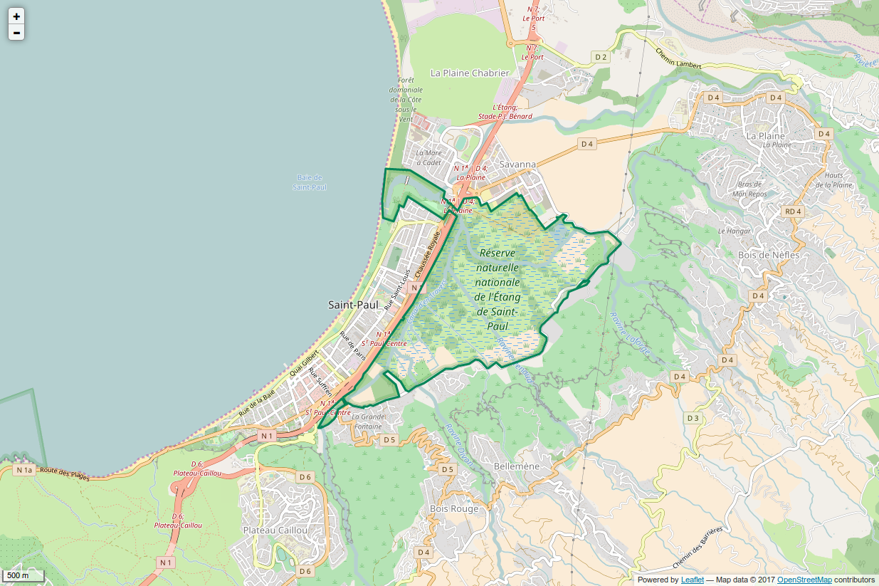 Périmètre de la RNN de l'Etang de Saint-Paul.